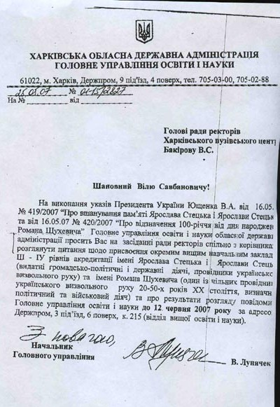 О присвоении имен Стецько и Романа Шухевича вузам Харькова. Харьков, Обладминистрация Арсена Авакова, 25 мая 2007. На фото нет никакого изображения, только буквы.